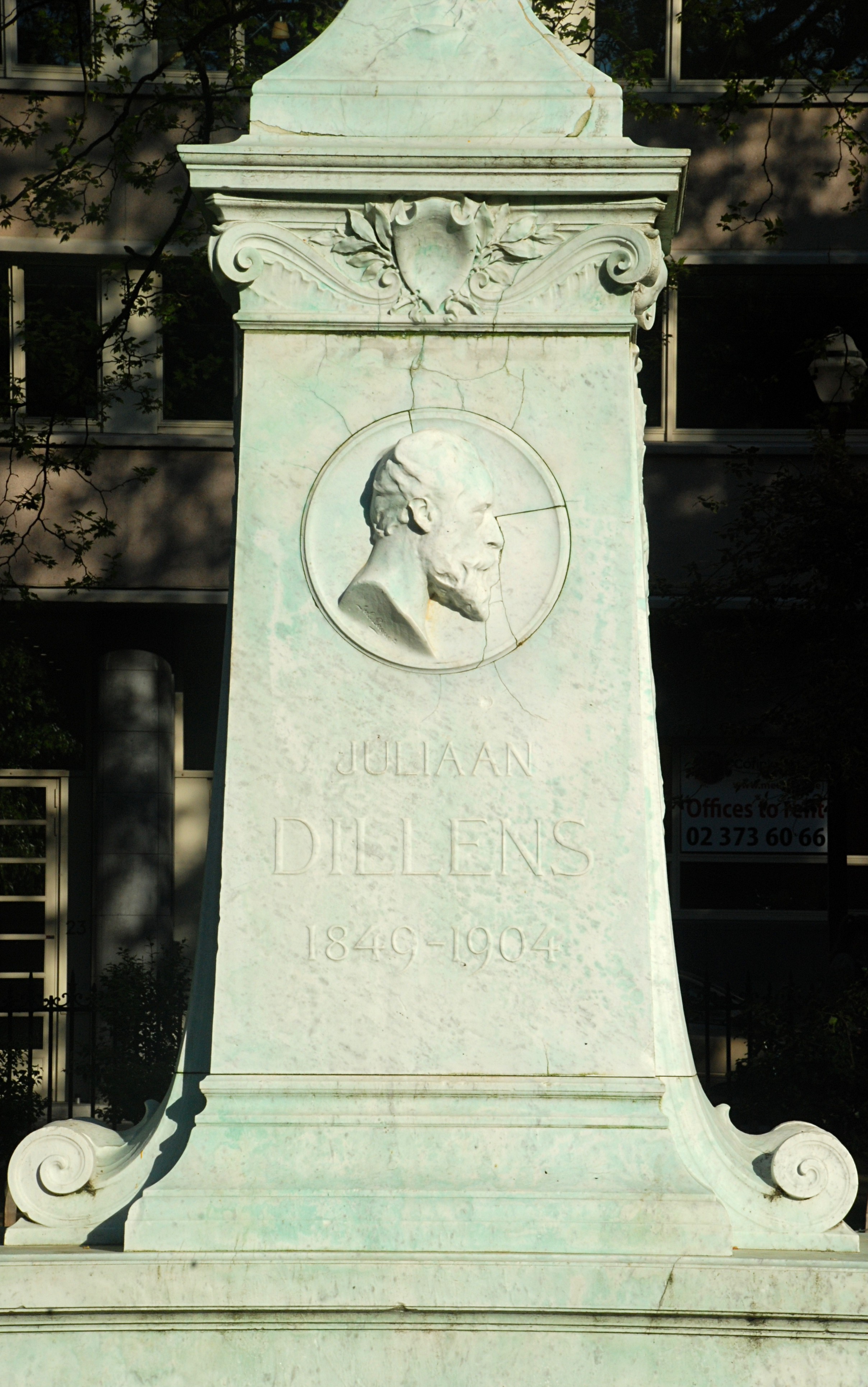 Belgique - Bruxelles - Monument Julien Dillens